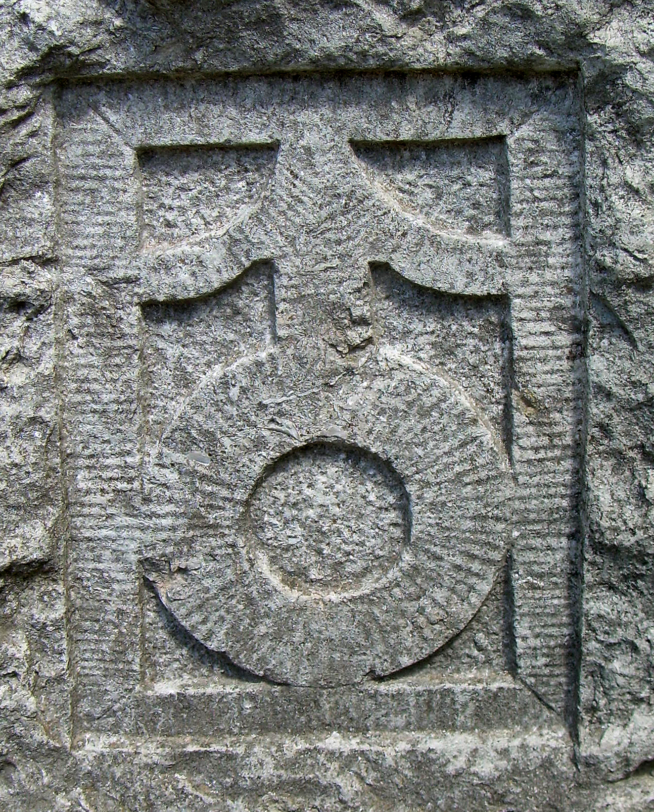 AB Kolms emblem på den ena av de två identiska stenarna resta på var sin sida om trappan till företagets bolagshus i Lilla Stolan (RAÄ-nr Berg 5:1), Bergs socken, Skövde kommun, f.d. Skaraborgs län, Västergötland, Västra Götalands län, Sverige. Företaget lades ned 1915. Stenarna betecknas som minnesstenar i fornminnesregistret.